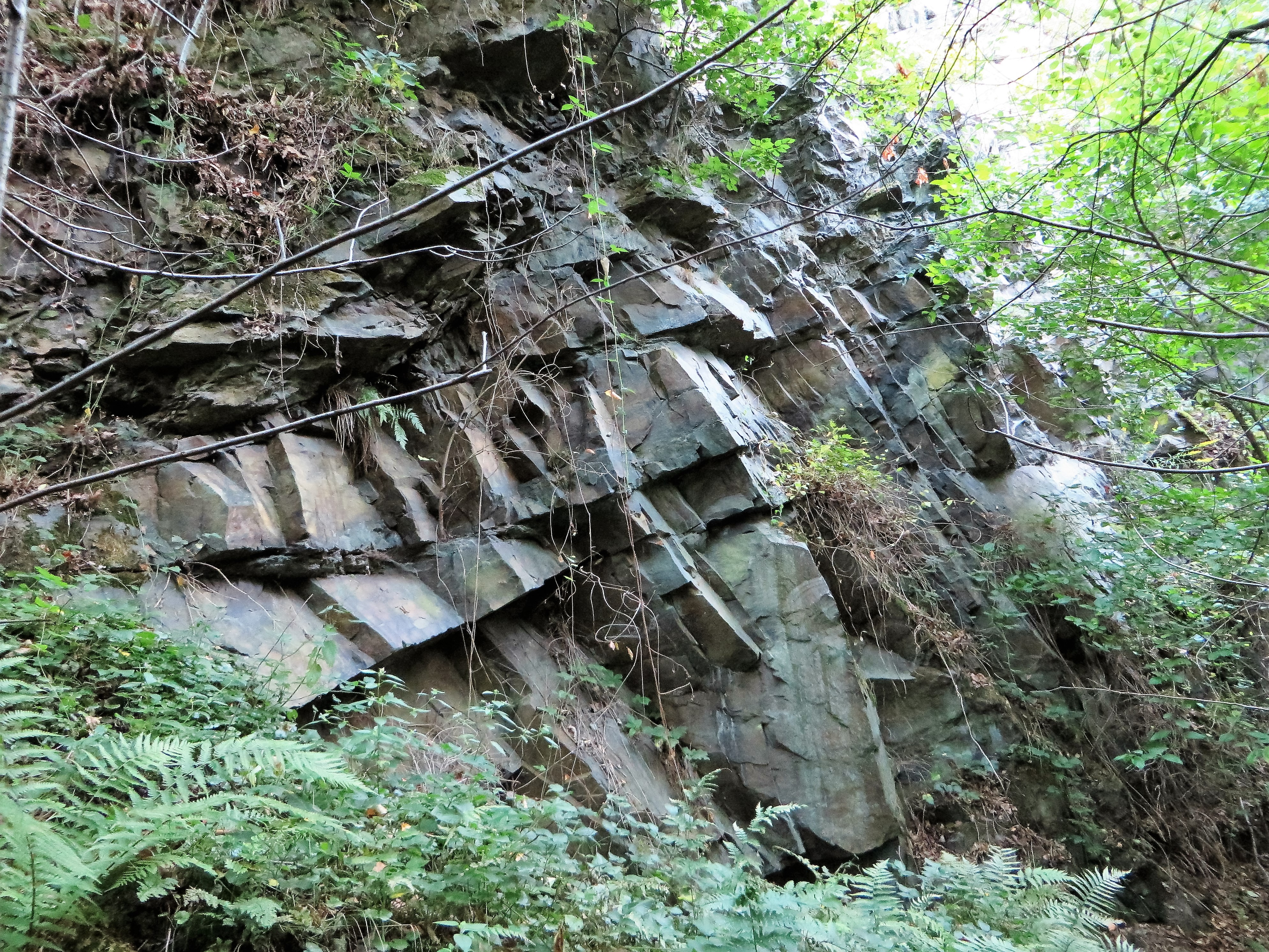 Geschützter Landschaftsbestandteil 1.4.2.71 „Steinbruch Mäckinger Bachtal“ in Hagen-Selbecke, östlich von Mäcking (Freilichtmuseum) am Fuße des Eilper Berges (381 m). Es handelt sich um einen ehemaligen Grauwacke-Steinbruch der Mühlenberg-Schichten des Mitteldevons mit Fels- und Steinschuttbereichen. Im Landschaftsschutzgebiet „Eilper Berg/Langenberg“ gelegen.